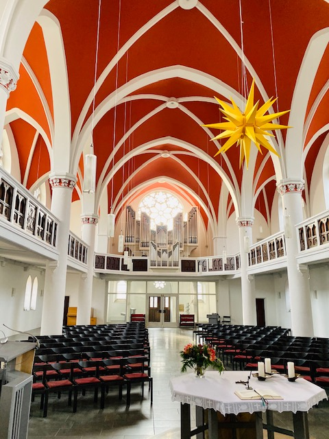 Innenansicht Richtung Süden, Christuskirche Hamm